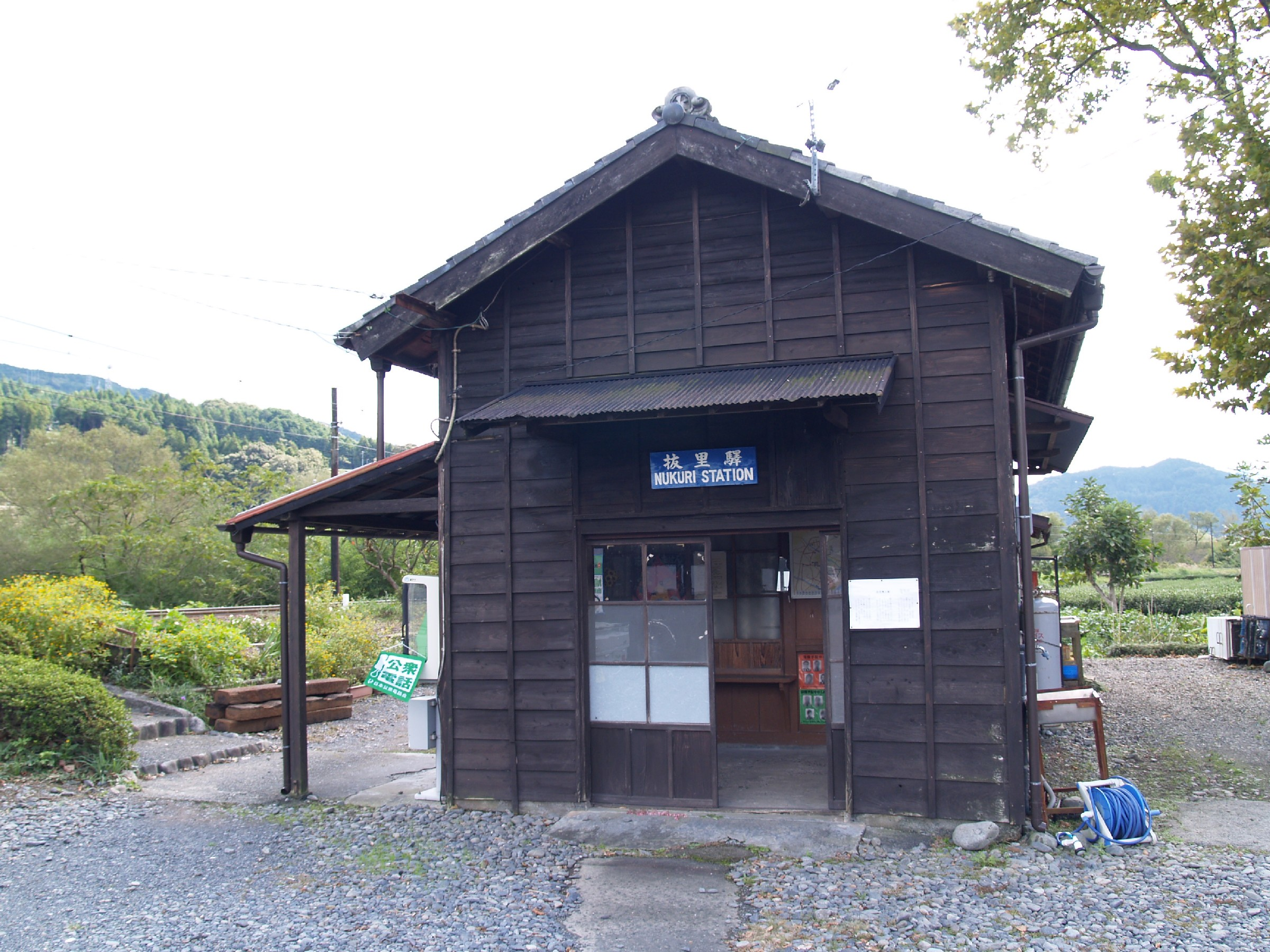 抜里駅駅舎